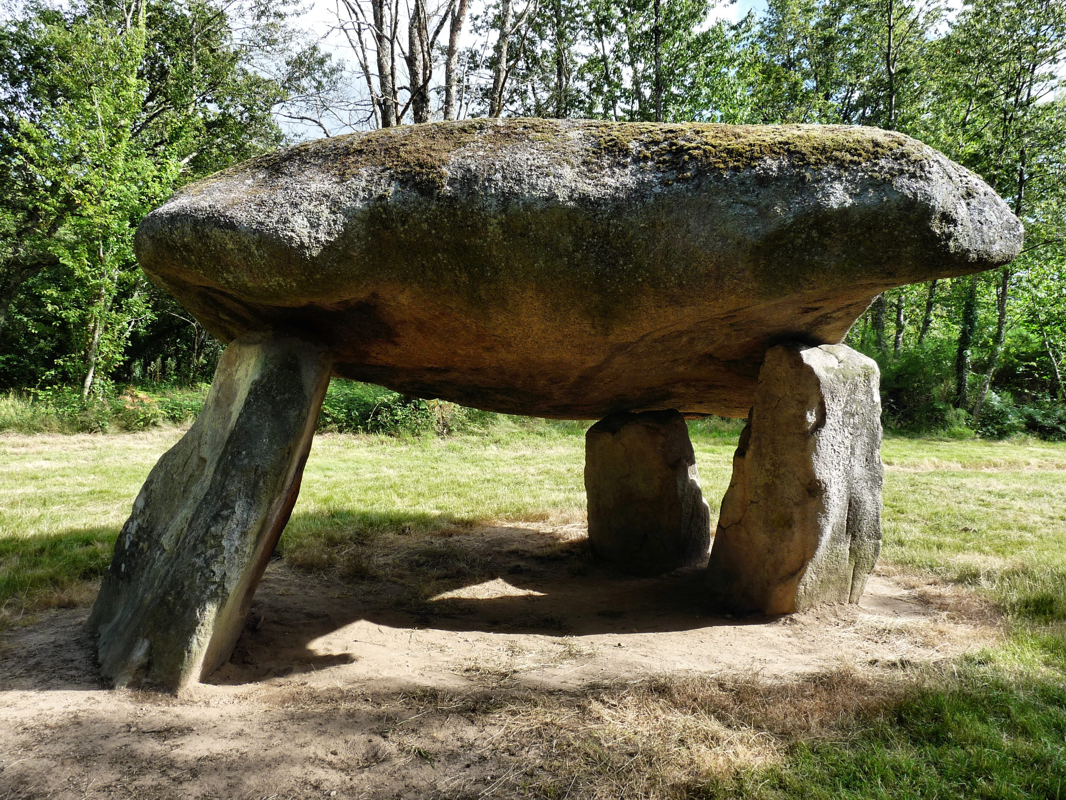 Dolmen de Chez Moutauddolmen, menhir, (Classé, 1940) .